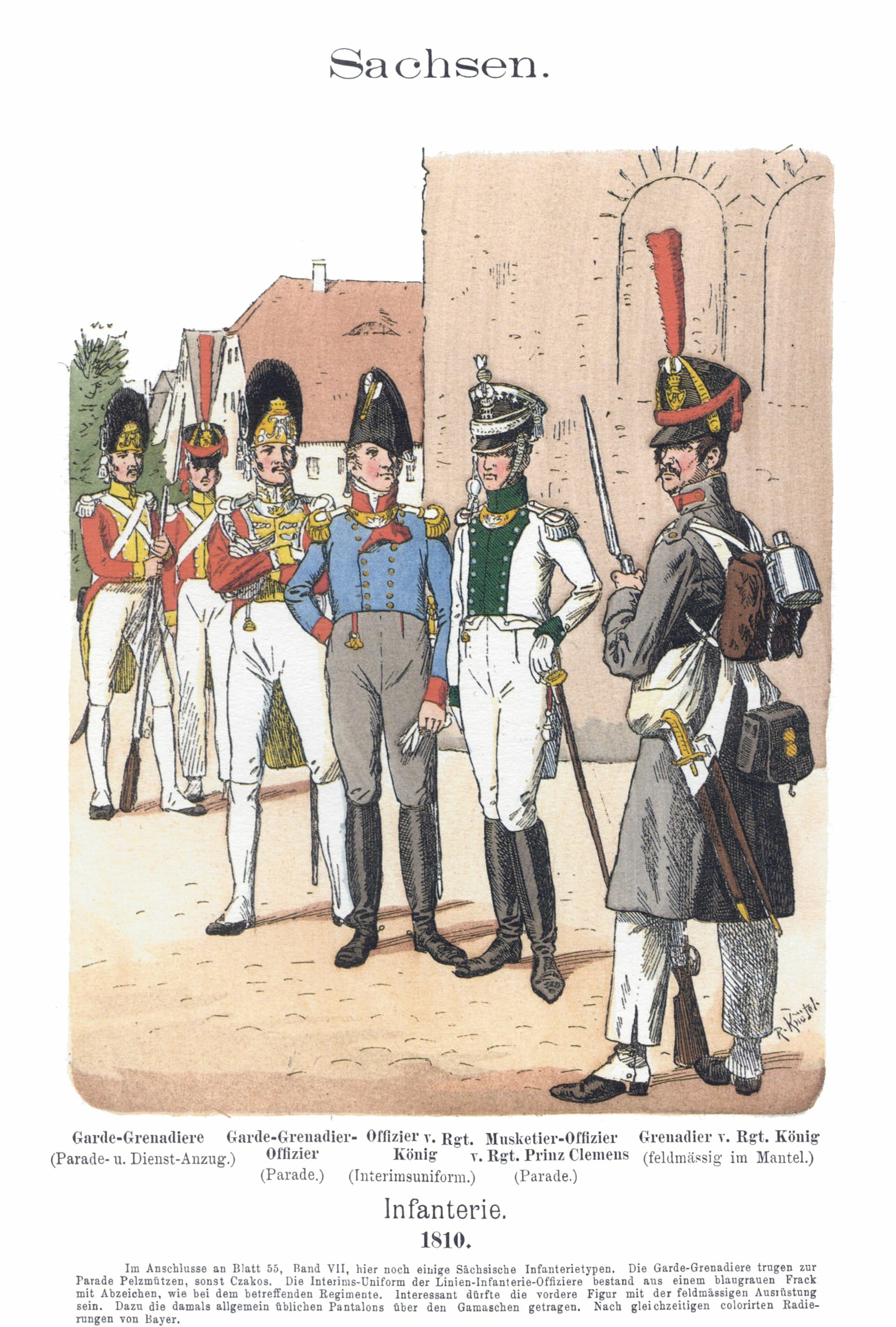 Иллюстрация Рихарда Кнотеля